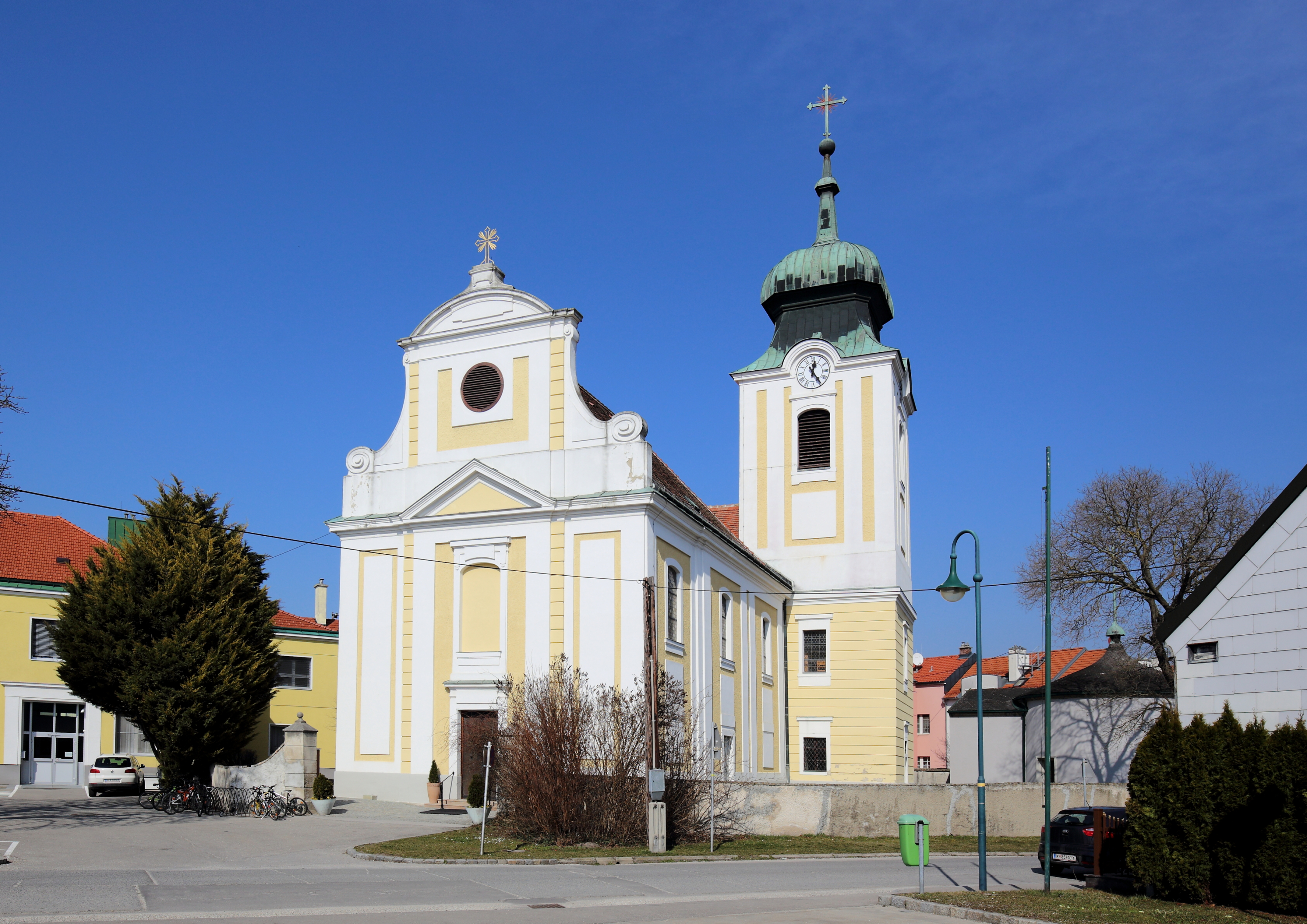 Südansicht der katholischen Pfarrkirche hl. Markus in der niederösterreichischen Marktgemeinde Leopoldsdorf im Marchfelde. Der barocke Sakralbau wurde von 1771 bis 1774 errichtet, wobei vermutlich der Turm des Vorgängerbaues bis zum Glockengeschoß in den Neubau integriert wurde.